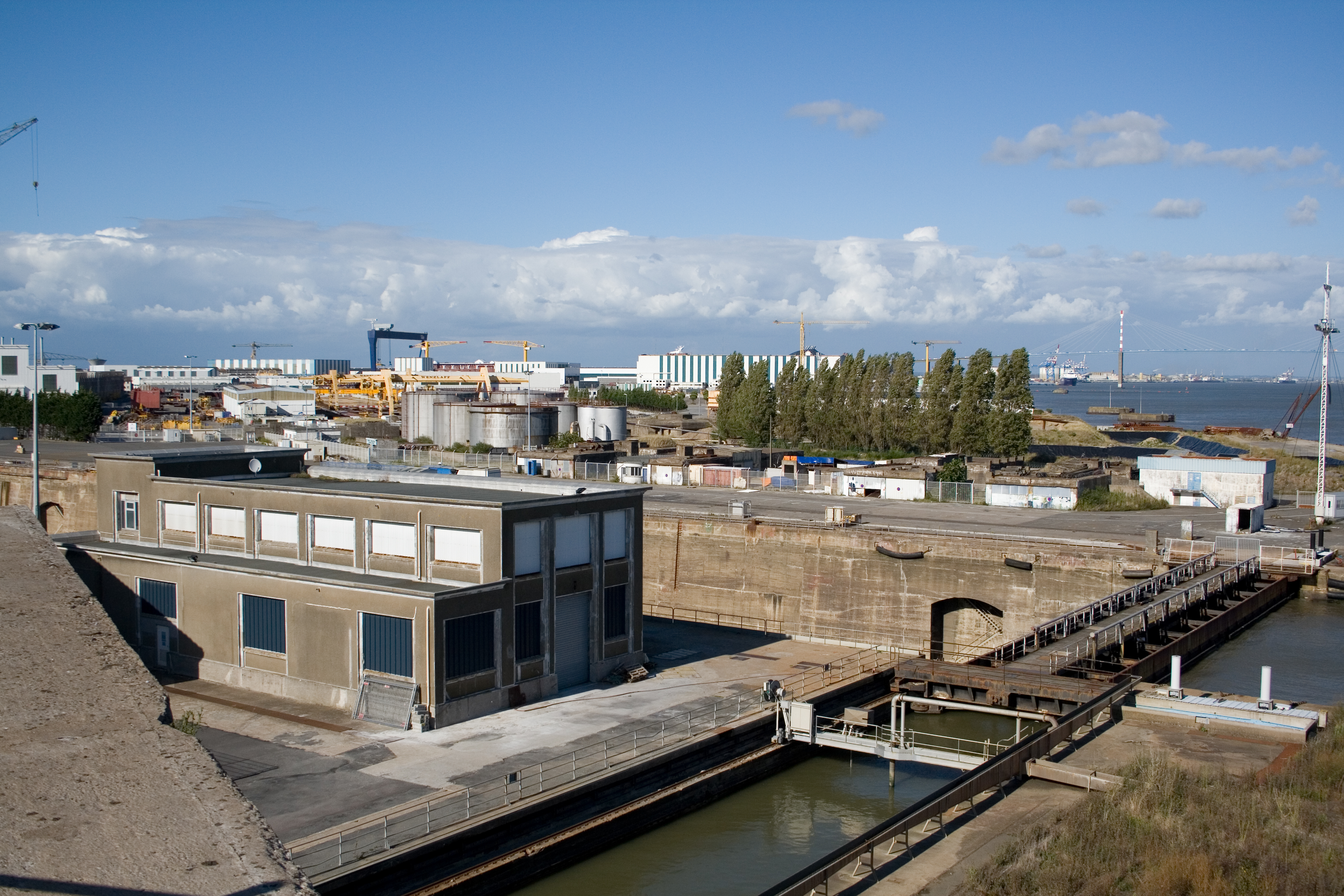 Saint-Nazaire, porte sud de la Forme Joubert avec le local des pompes.